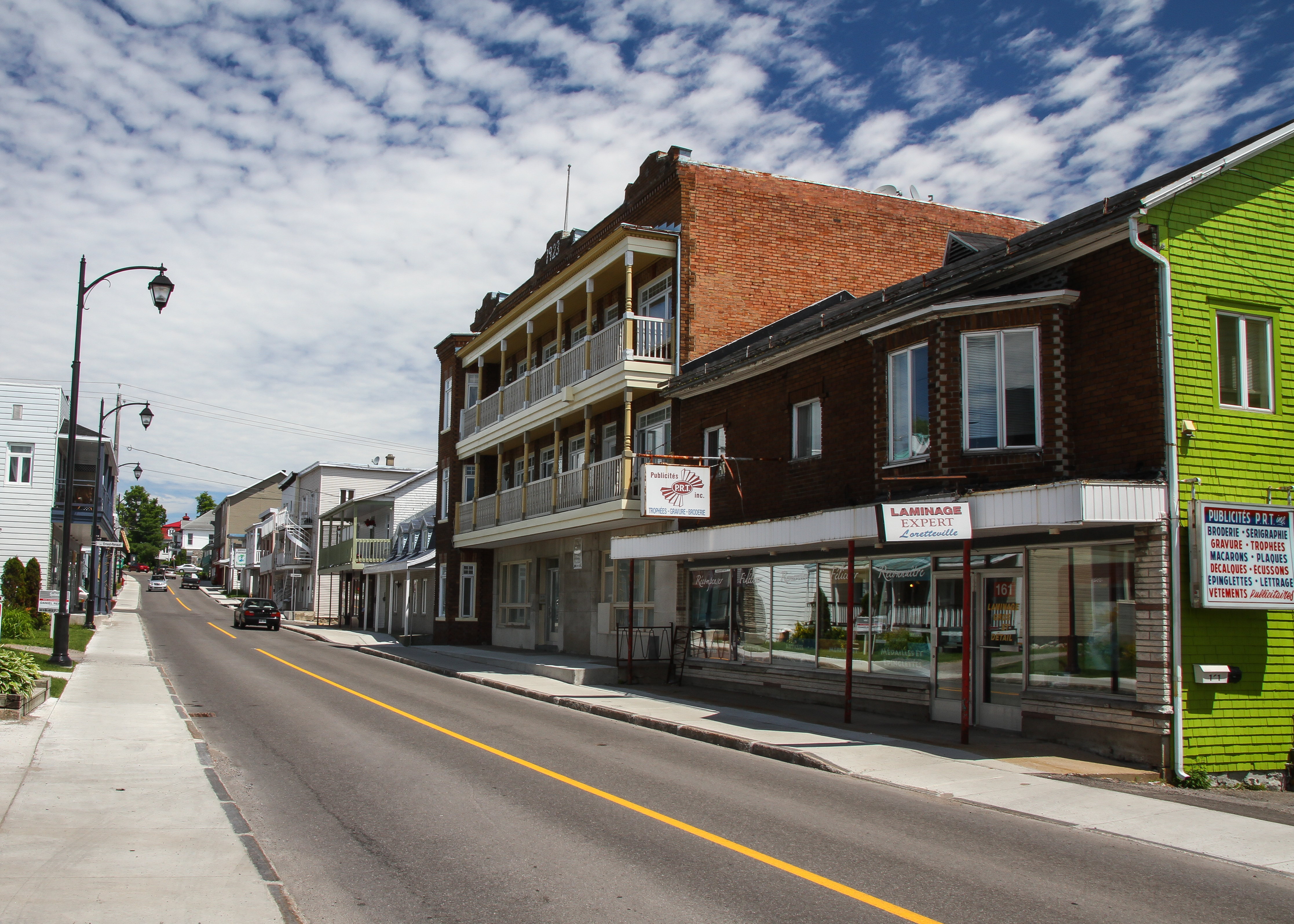 Rue Racine, Loretteville